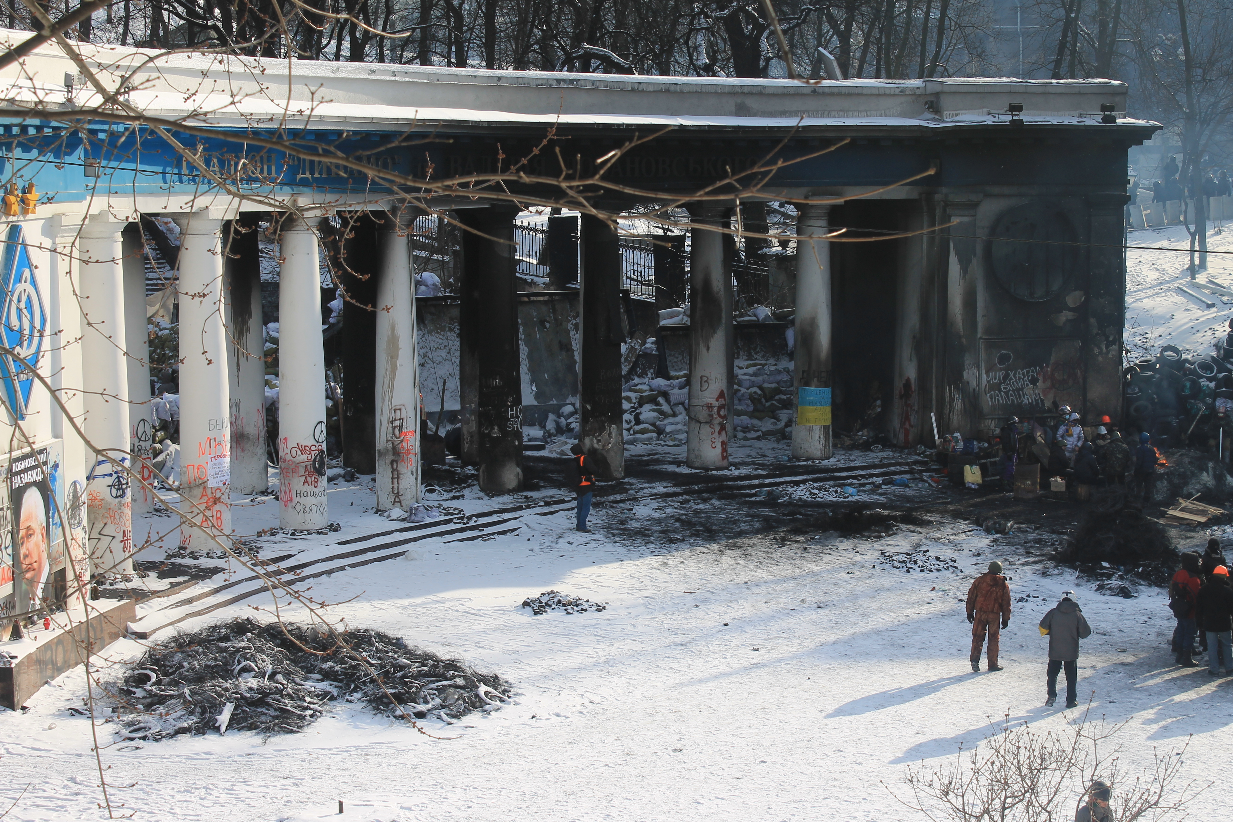 Київ 29 січня 2014. Вхід на стадіон "Динамо"